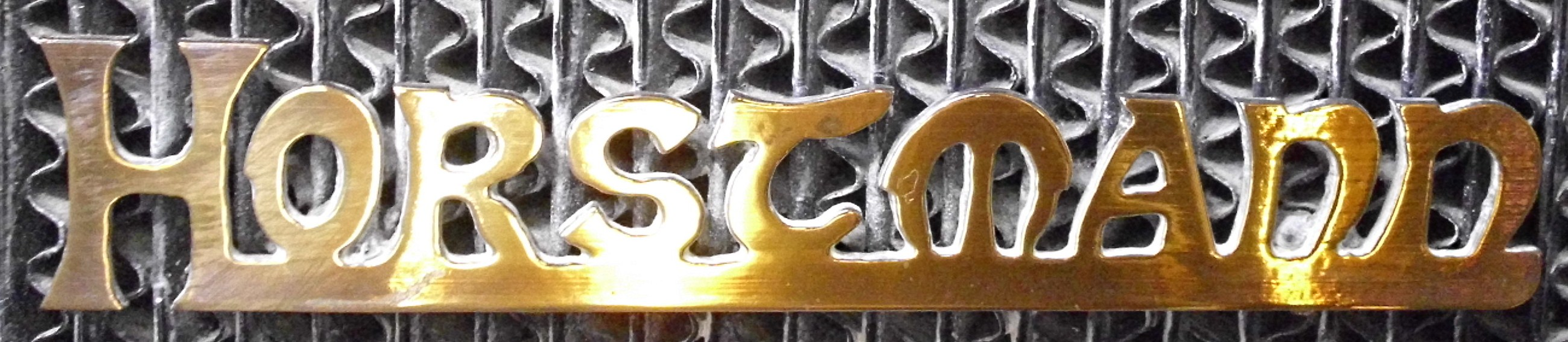 Emblem Horstmann